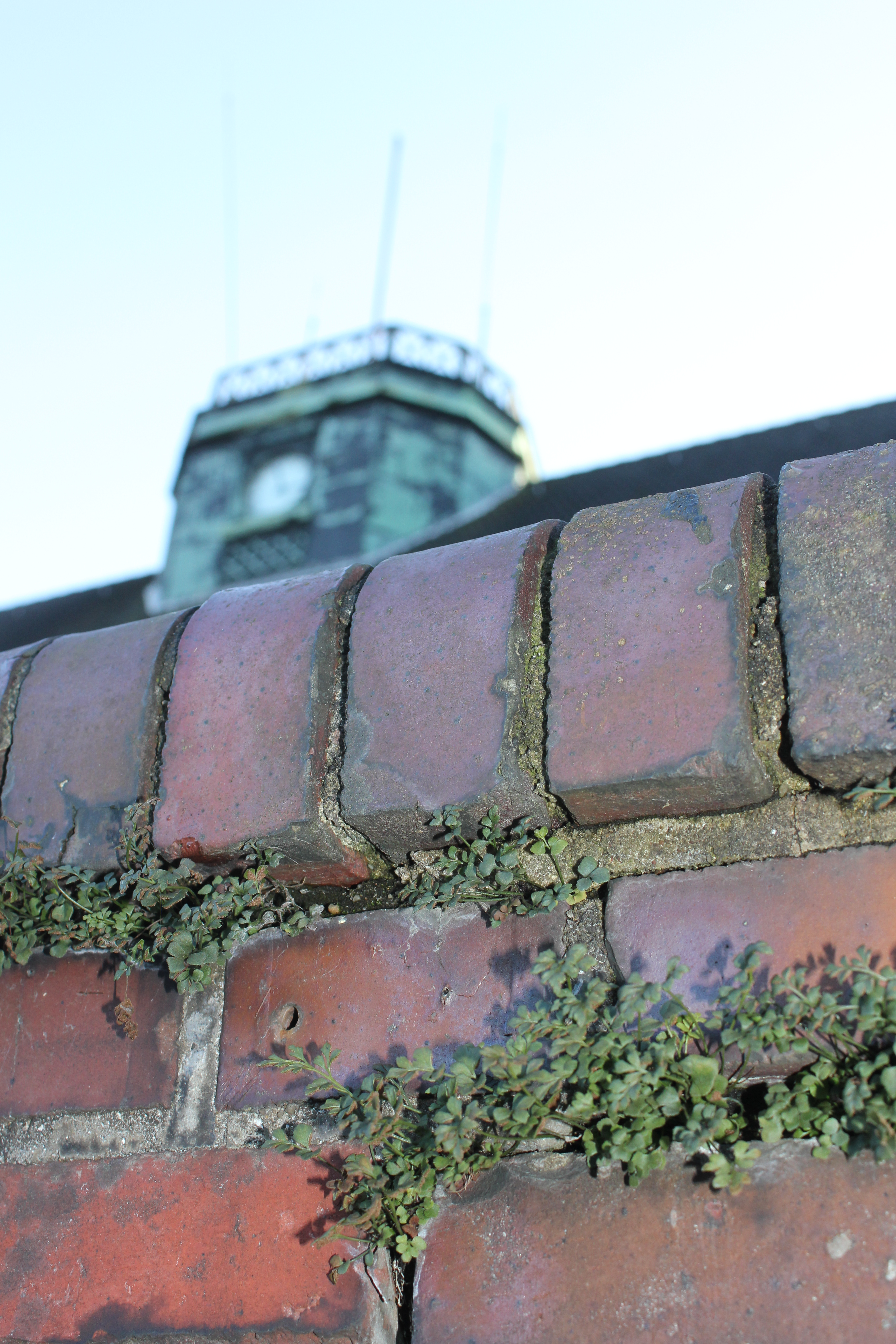 Mauerraute an der Mauer der Bahnhofstreppe des Bahnhofs Flensburg, Bild 01